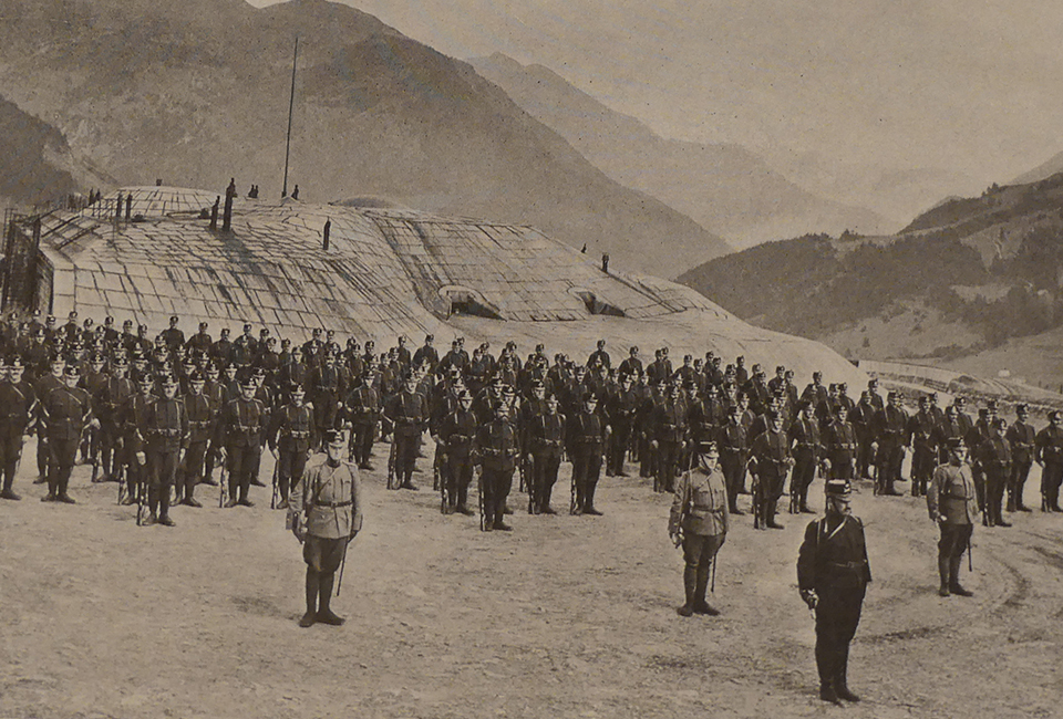 Detachement der Festungs-Artillerie-Kompagnie 1 vor dem Forte Airolo), Airolo TI, Schweiz